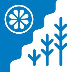 Kose valla lipp.